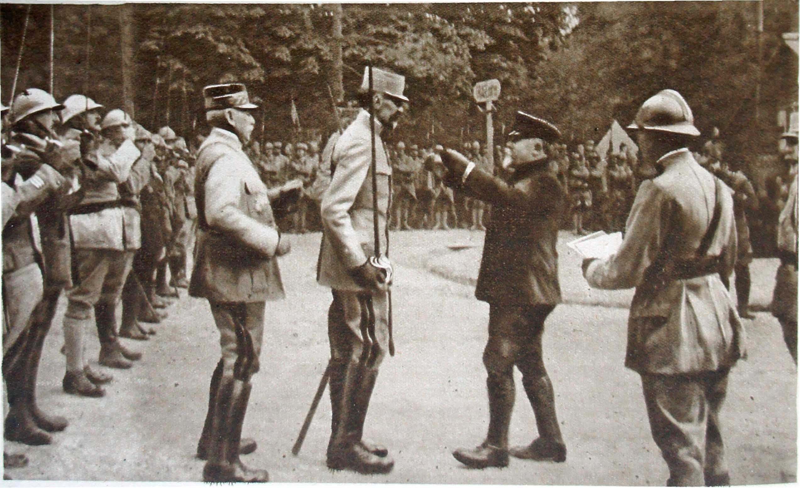 le Miroir _N°151, page_6_Micheler_décoré_par_Poincaré. De dos casqué et papiers à la main le général Marie émile Fayolle venant d'être fait Grand officier , derrière Micheler, le général Marie Paulinier.